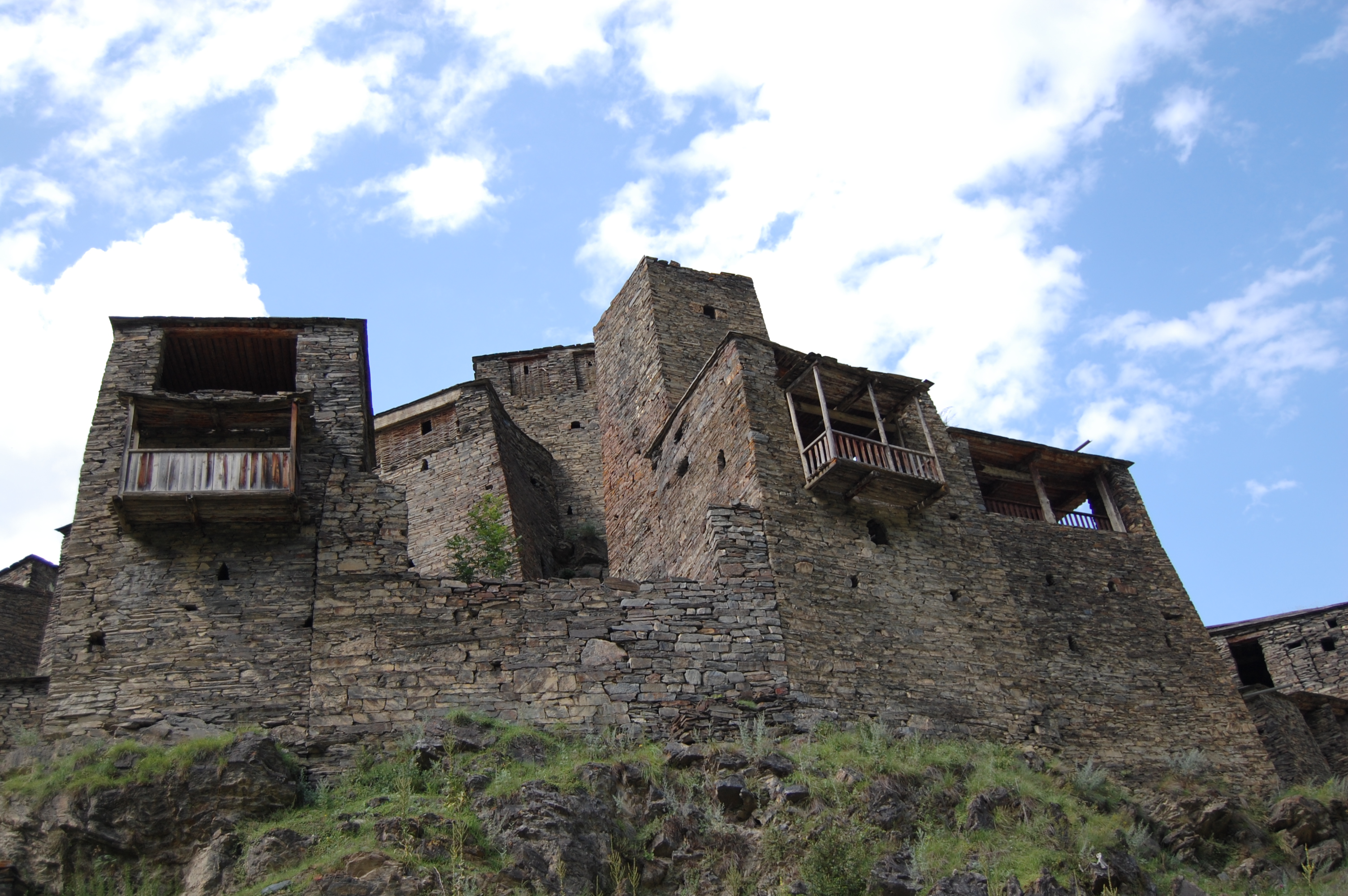 Shatili Georgia - Sakartvelo